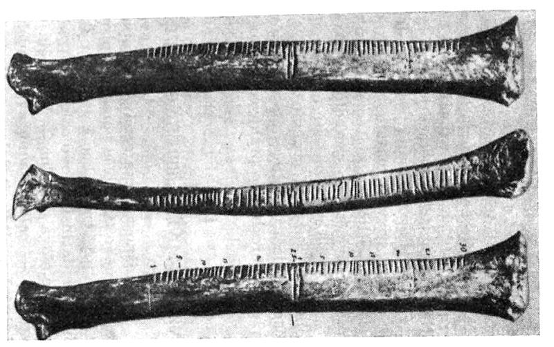 Vlčí radius ( Věstonická vrubovka ) Inv. č. 30047 (MZM - Ústav Anthropos Brno)